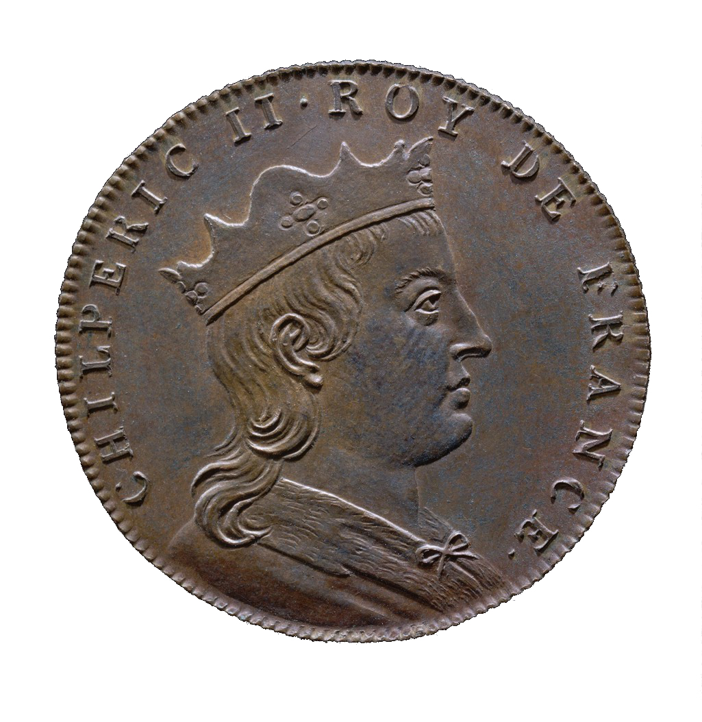 Jean Dassier (1676-1763) - Chilpéric II roy de France (670-721). Buste du roi à droite ceint d'une couronne.